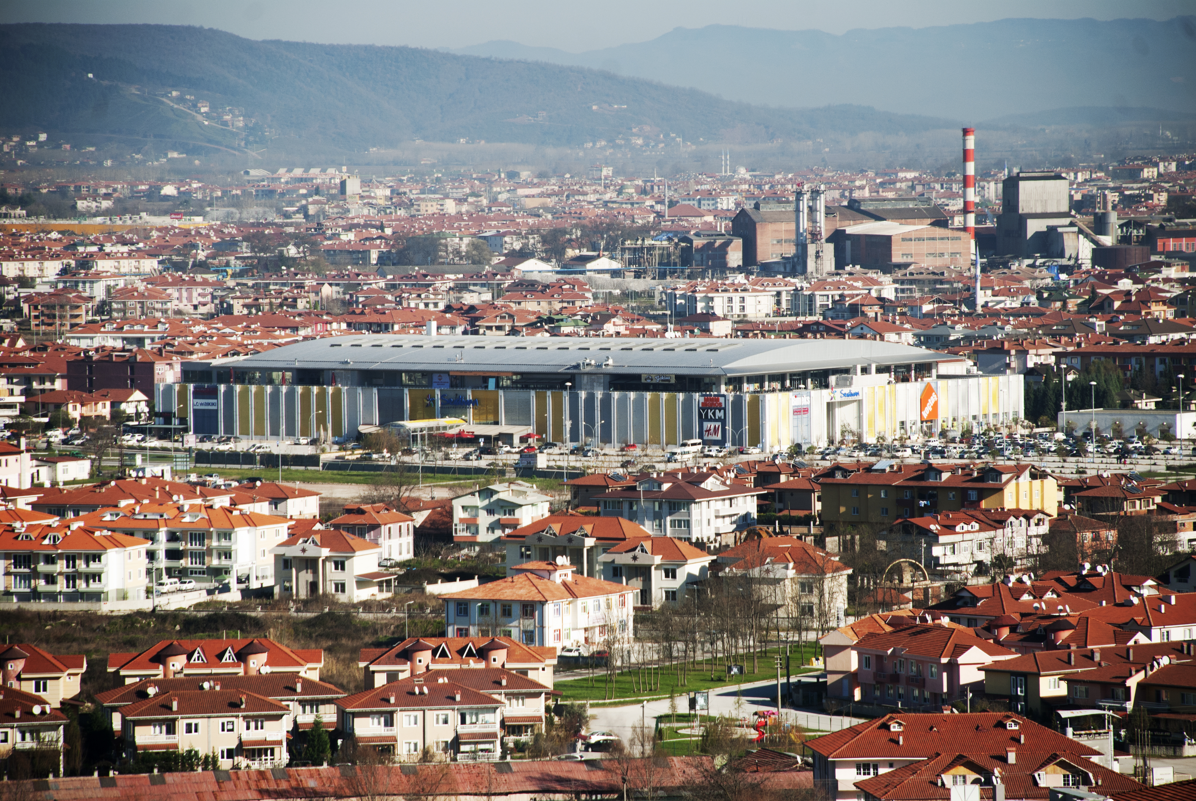 Serdivan AVM çevresi. Arkada şehrin büyümesiyle şehir içinde kalmış Adapazarı Şeker Fabrikası.